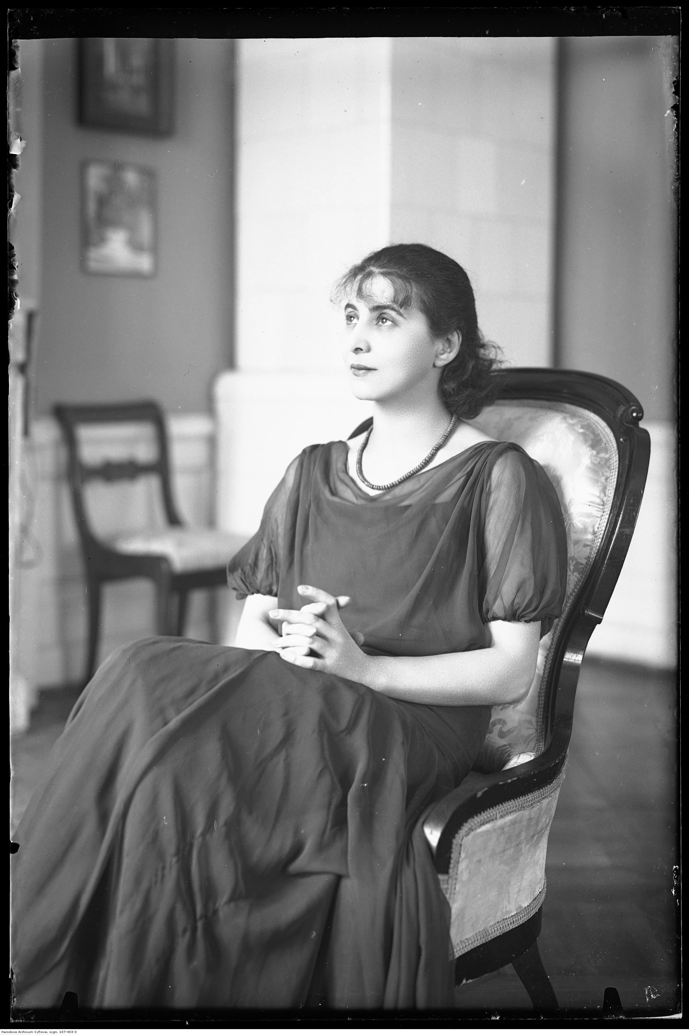 Portret siedzący (całopostaciowy) w fotelu.